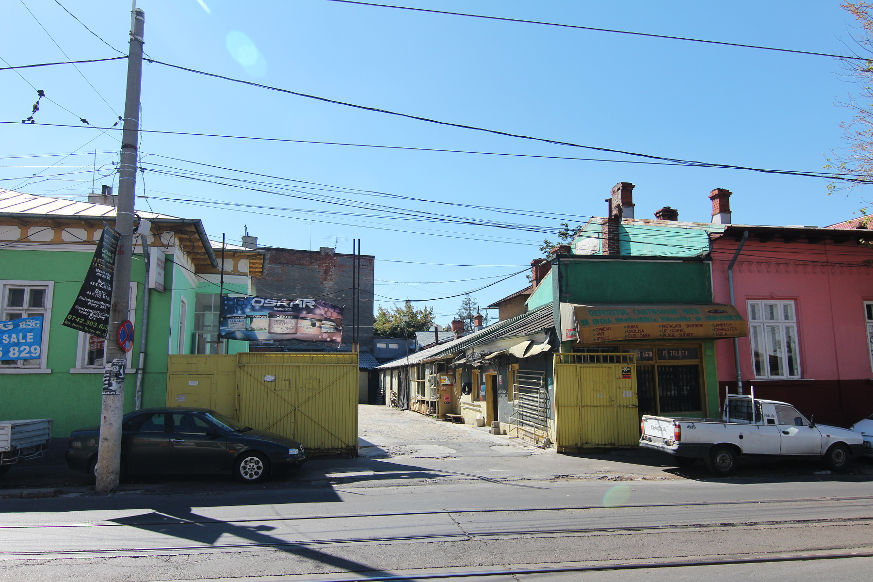 Casă pe Calea Călărașilor